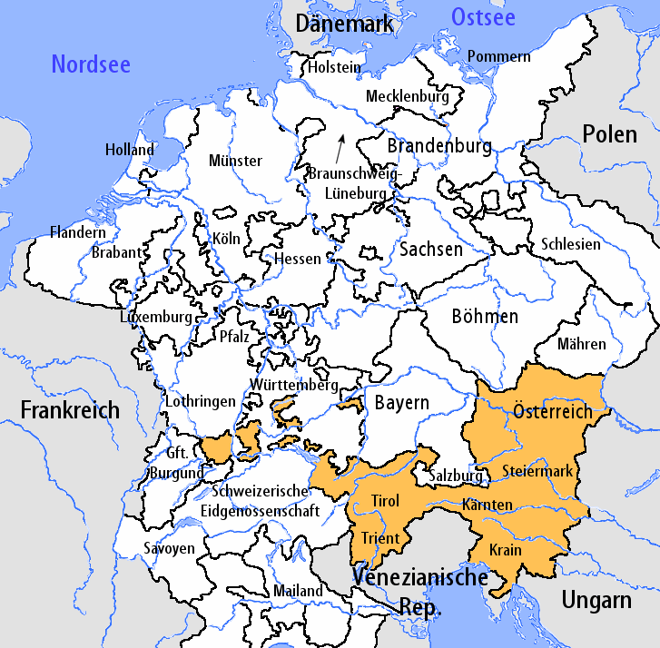 Its contents are based in part on a map published in the "Historical Atlas" by Prof. William R Shepherd, pub. Henry Holt & Co. (New York, 1911).